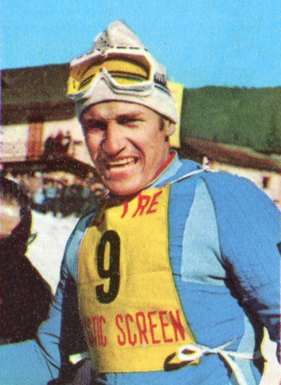 CAMPIONI DELLO SPORT 1967/68-n. 510 - PERILLAT